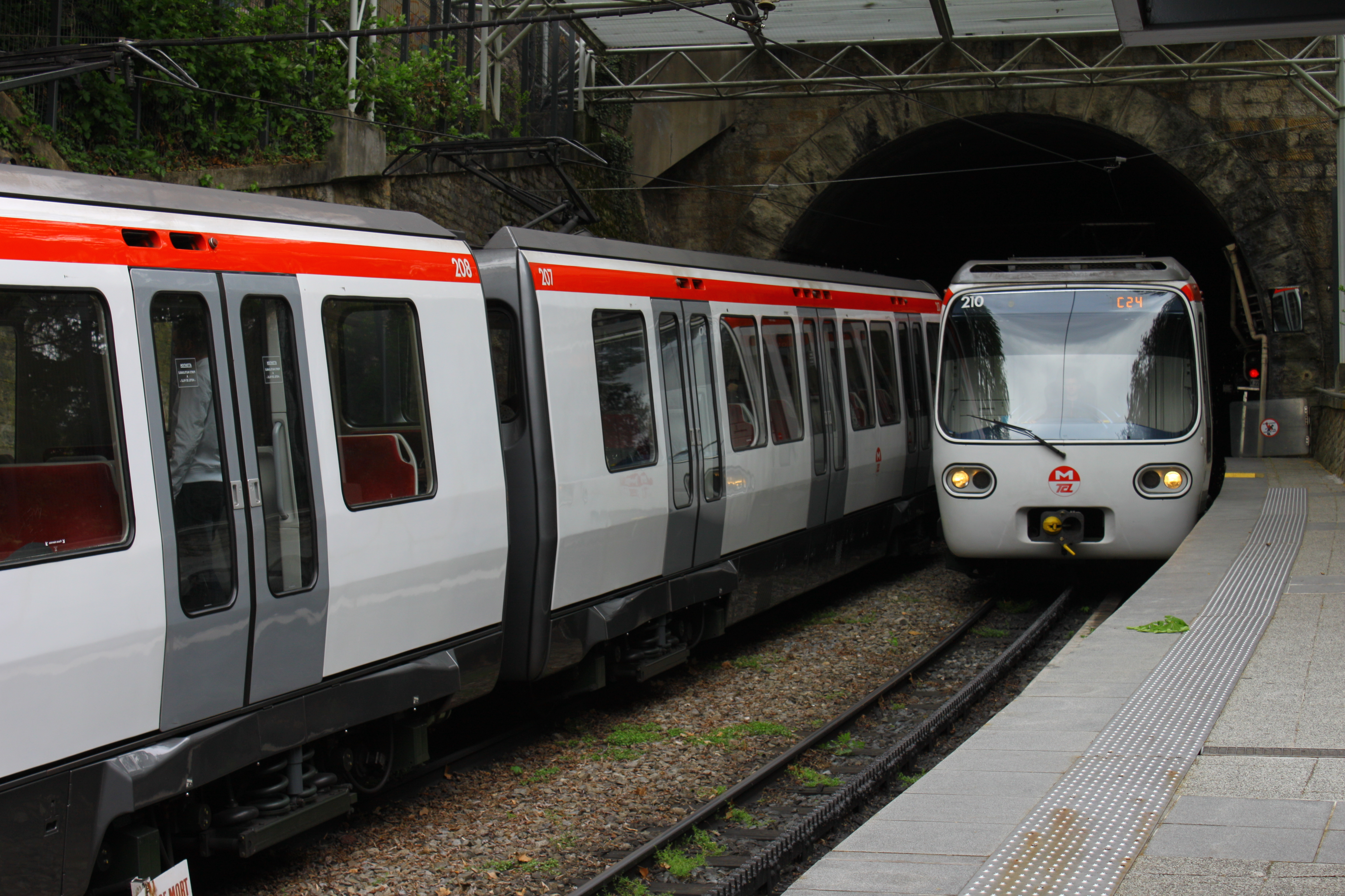 Deux MCL 80 qui se croisent à la station Croix-Paquet sur le ligne C